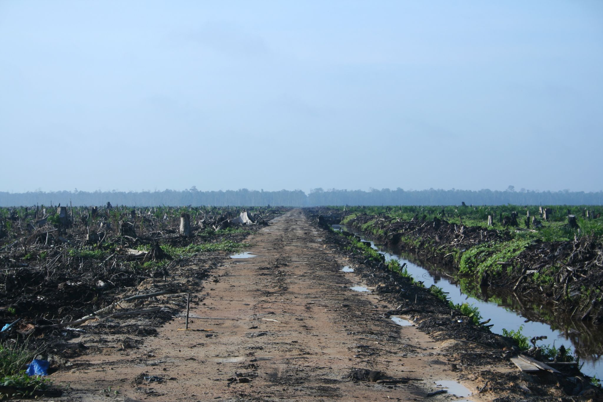 Oil Palm Concession in Riau, Sumatra